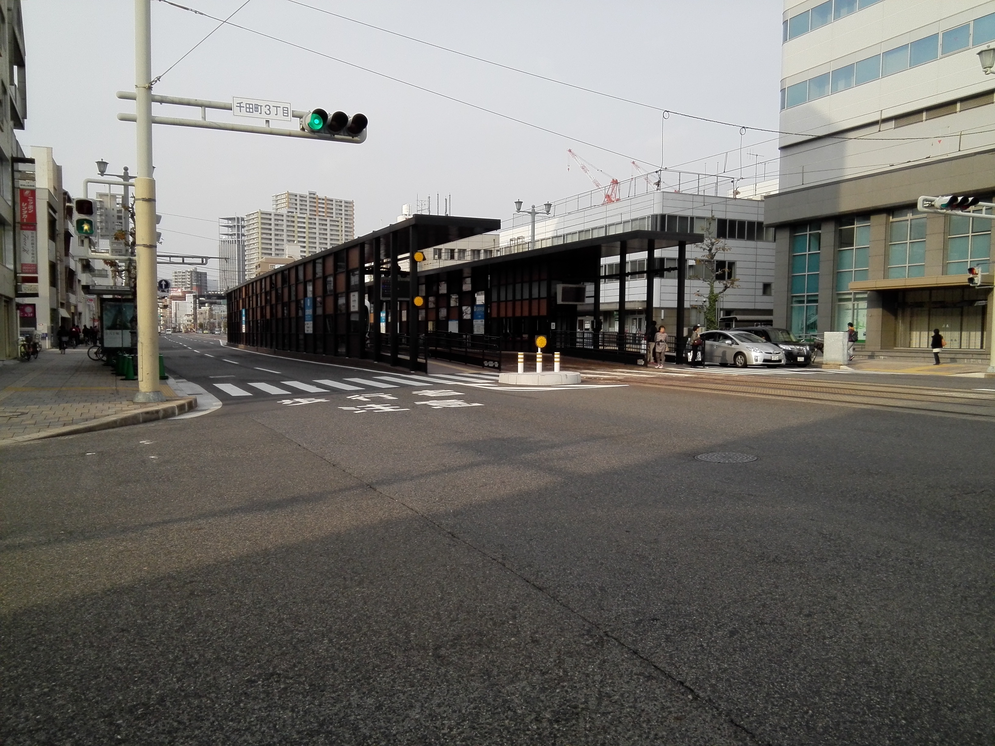 広島電鉄 広電本社前駅